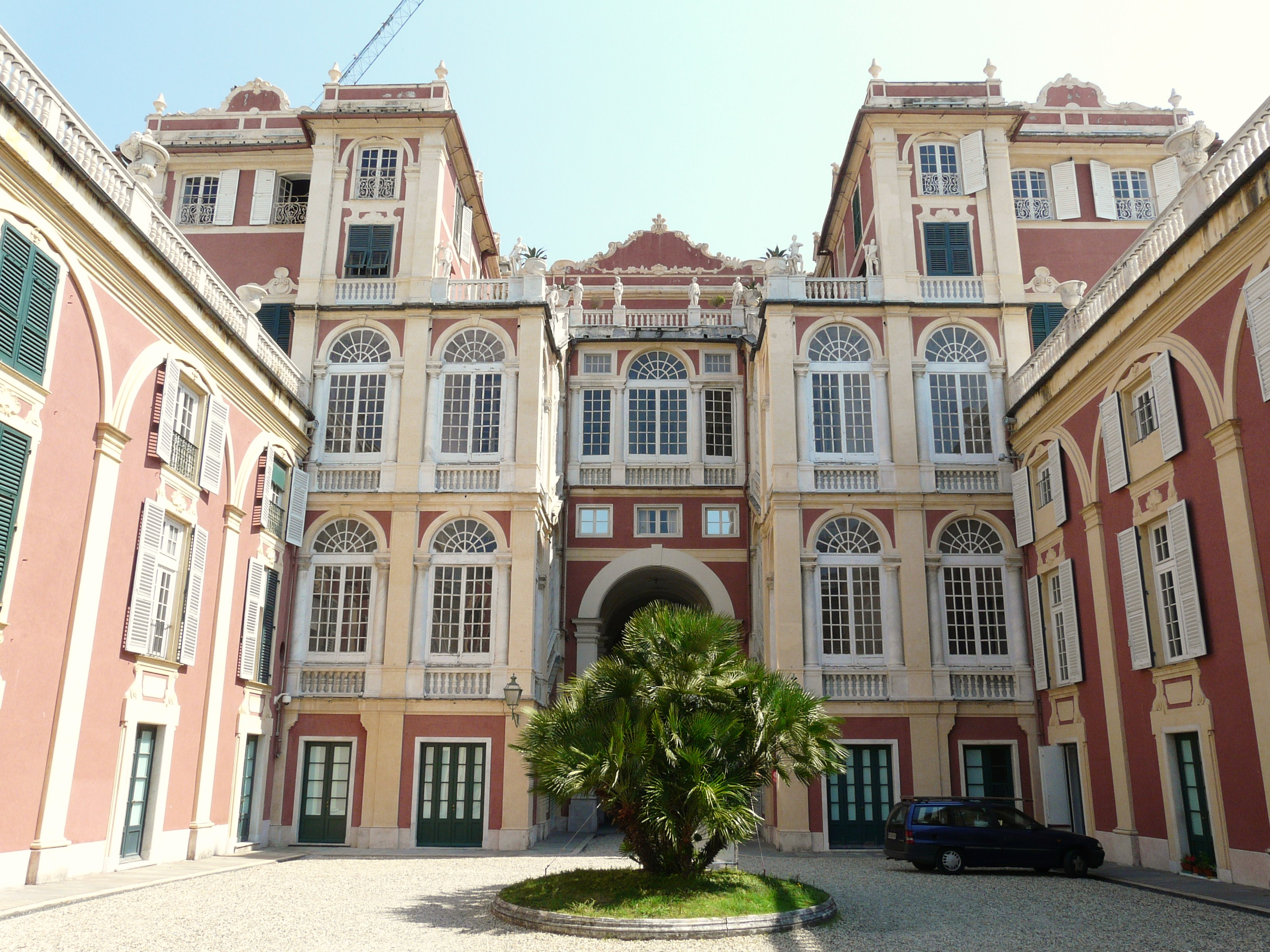 Palazzo Reale, Genova, Liguria, Italia